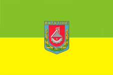 Прапор міста Ватутіне